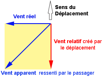 Description : Schéma vent apparent Date : Juillet 2006 Author : Pline photo ou réalisation (schéma) personnelle